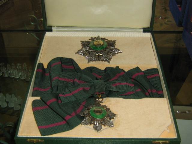 وسام الكوكب الأردني من الدرجة الاولى المقدم من جلالة الملك الحسين بن طلال إلى الدكتور قاسم الريماوي